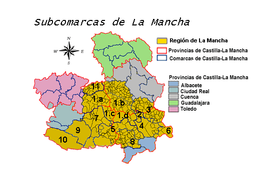 Situación de las subcomarcas de La mancha